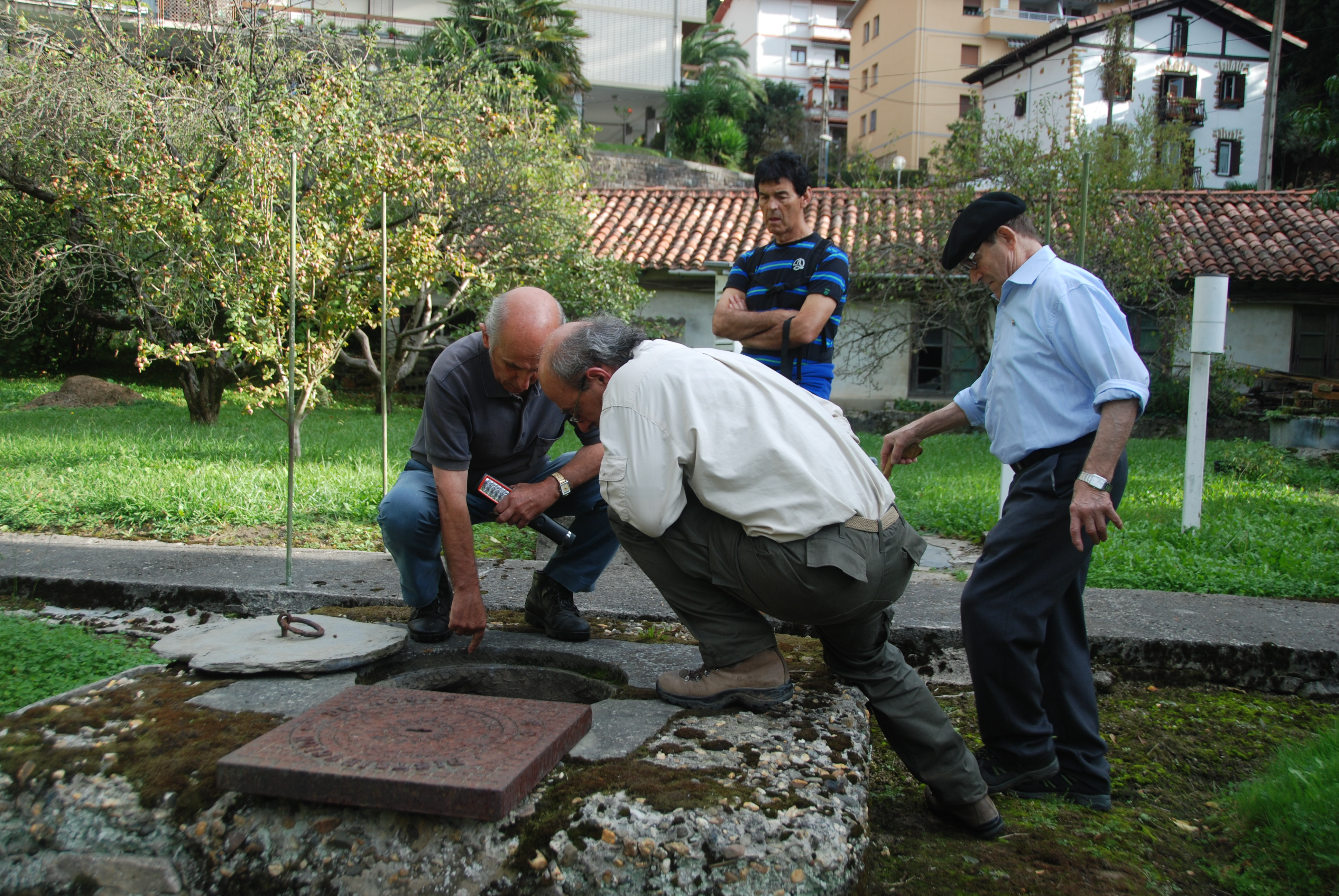 Soroborda ur-biltegia. Ulia, Donostia